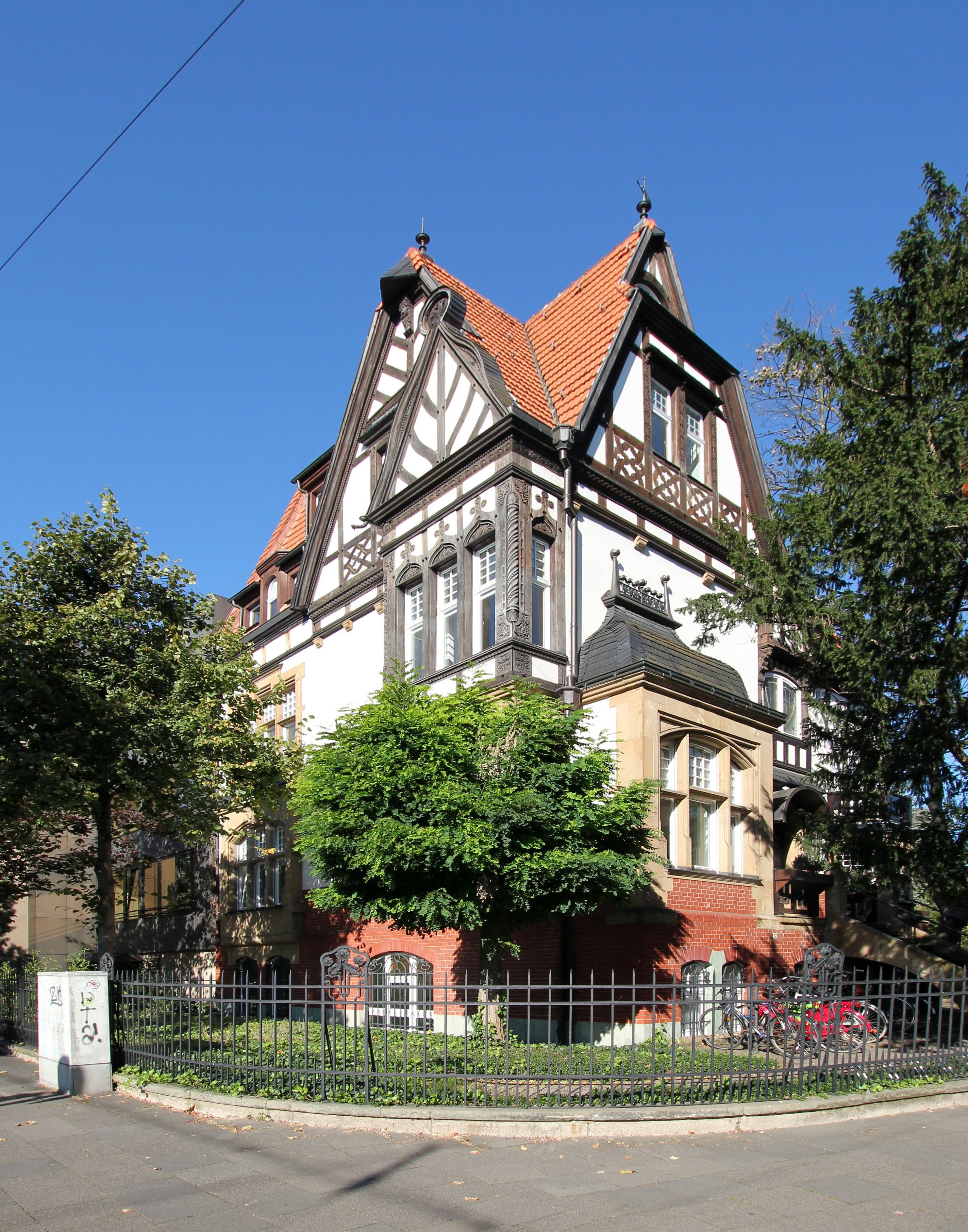 Köln-Lindenthal, Kitschburger Str. 1